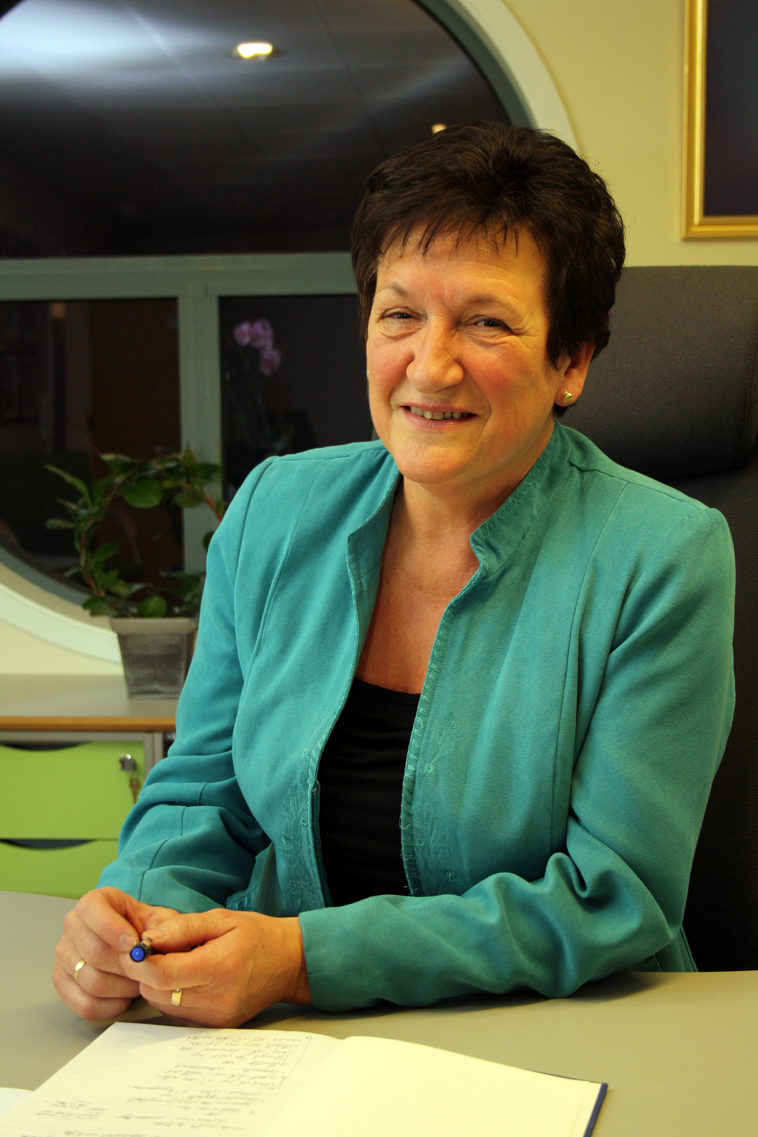 Hill-Marta Solberg på sin første dag som fylkesmann i Nordland